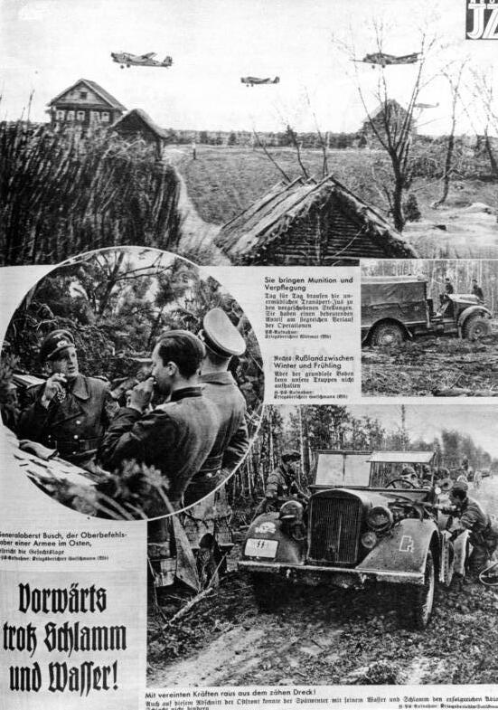 "Vorwärts trotz Schlamm und Wasser!" ; SS-PK Bildberichter Wittmar, Gottschmann Generaloberst Busch, der Oberbefehlshaber einer Armee im Osten, bespricht die Gefechtslage